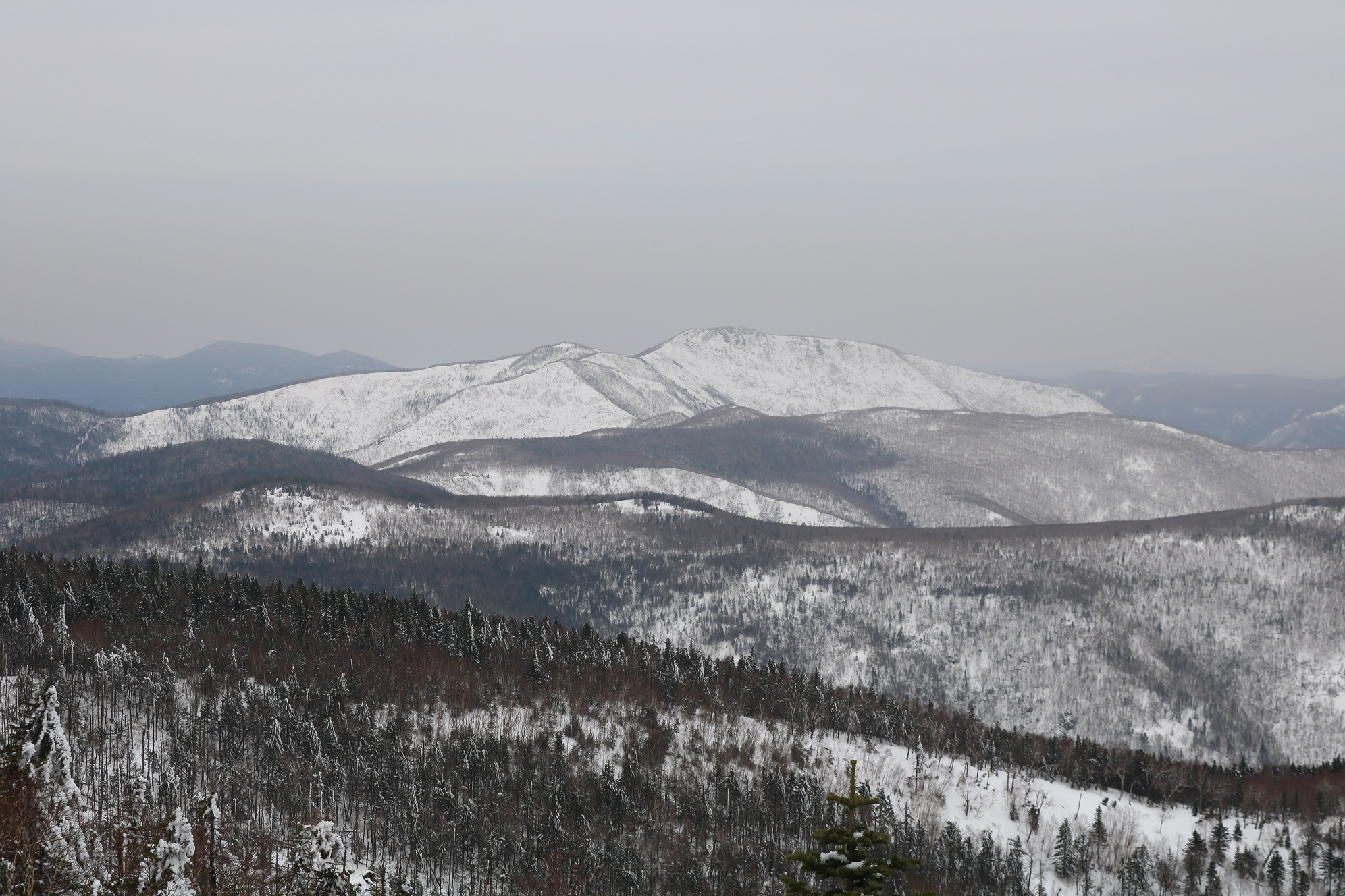 Гора Седая с вершины г. Якут-Гора, начало мая. Главный водораздел Центрального Сихотэ-Алиня.